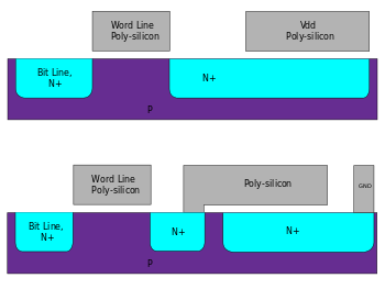 шемтаски приказ